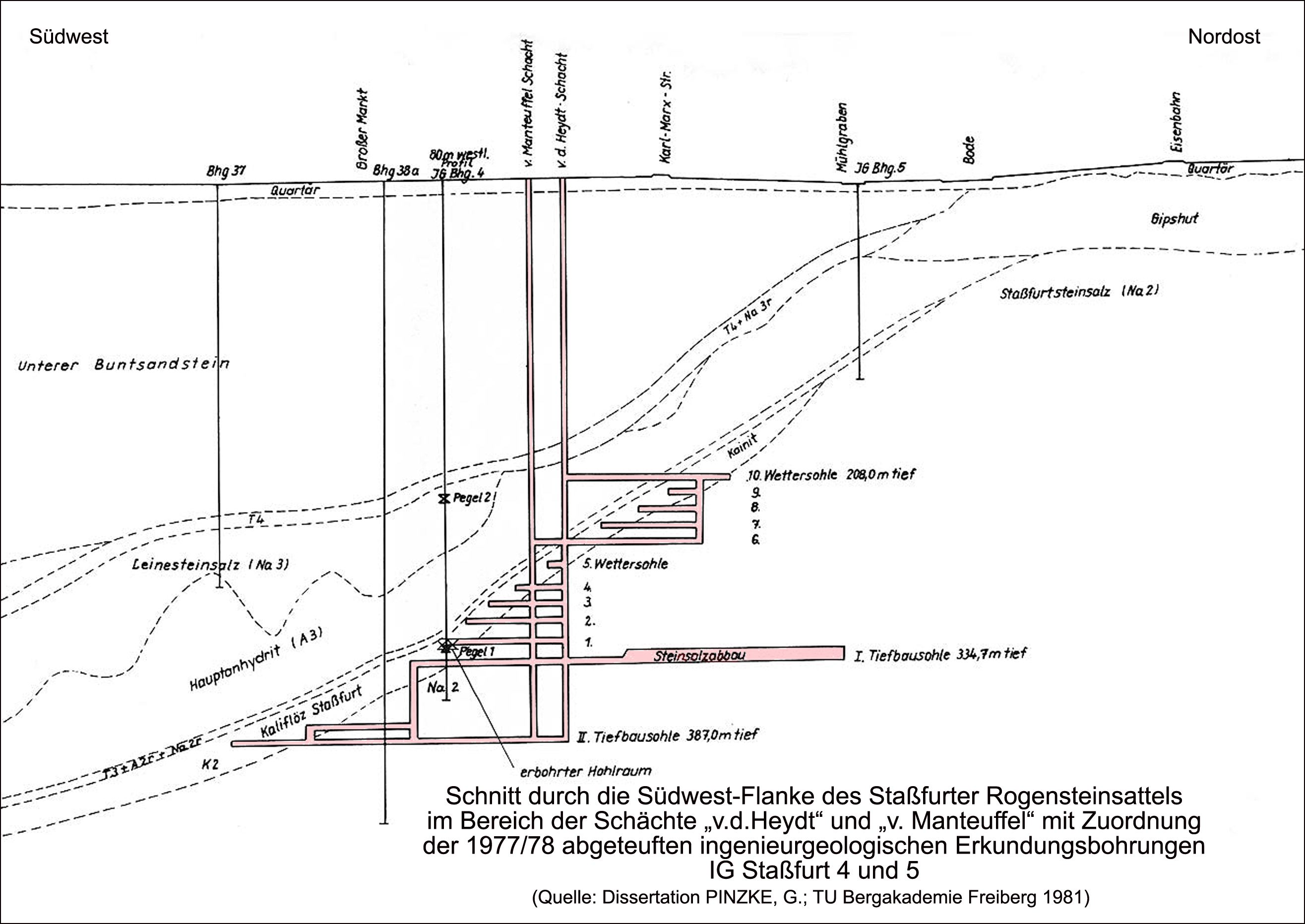 Schichtenfolgen und seigere Darstellung des Grubengebäudes der Doppelschachtanlage v.d.Heydt / v.Manteuffel.